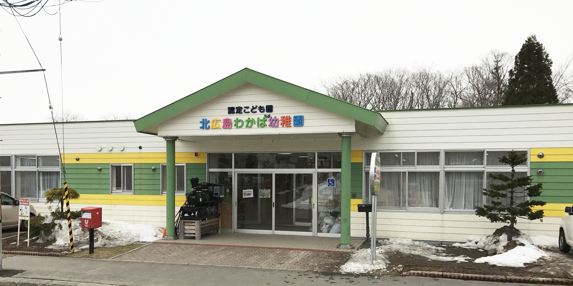 認定こども園 北広島わかば幼稚園の園舎です。